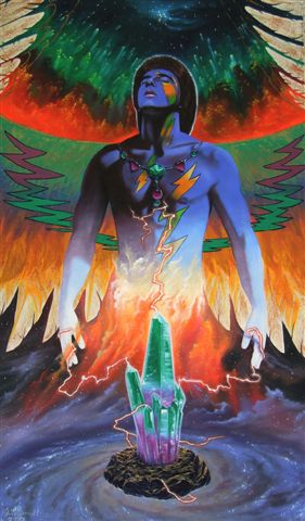 Gemälde von Gabriele L. Berndt